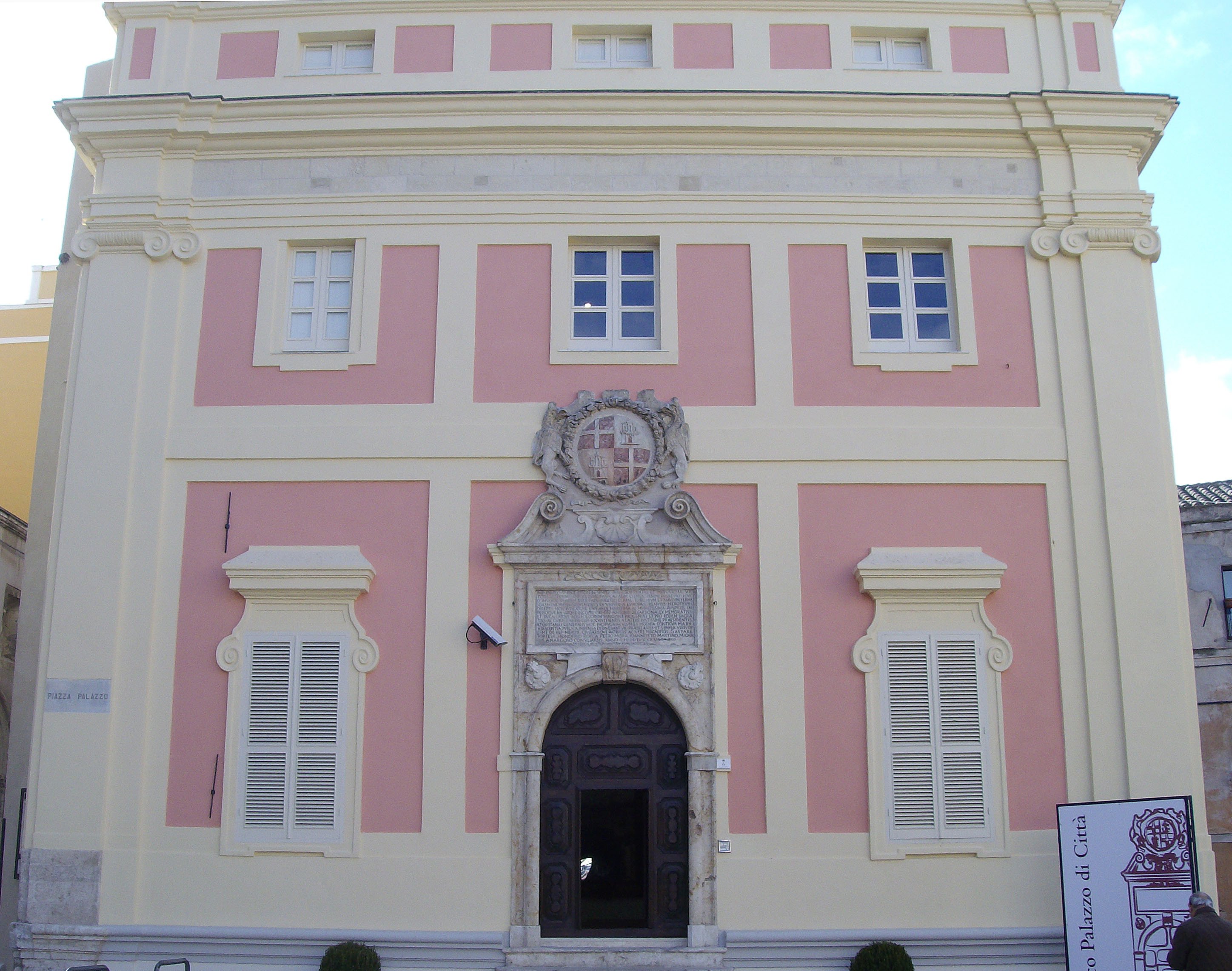 Facciata dell'ex palazzo civico (XVIII secolo) - Cagliari